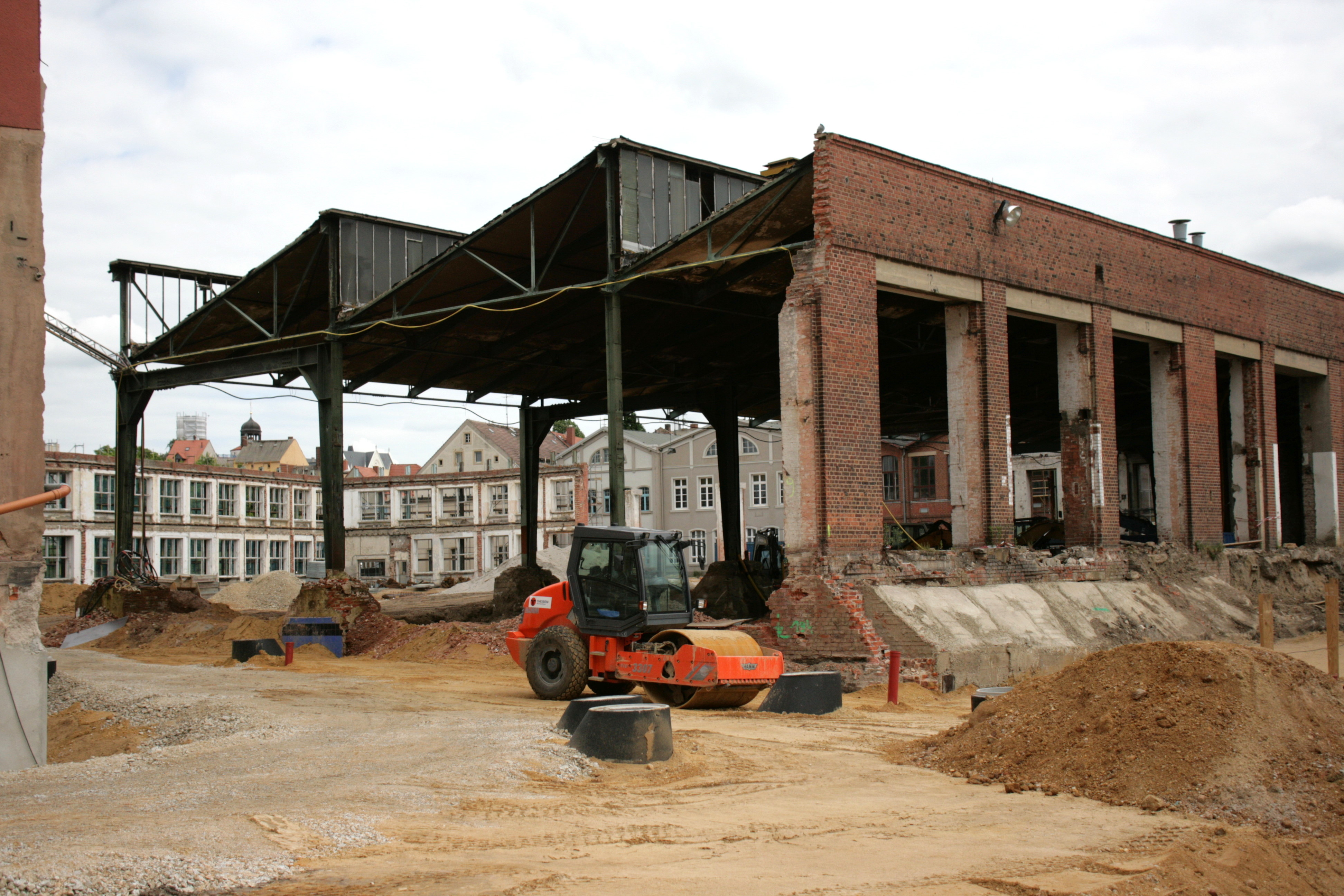 Waggonbau Görlitz Werk I, Christoph-Lüders-Straße in Görlitz